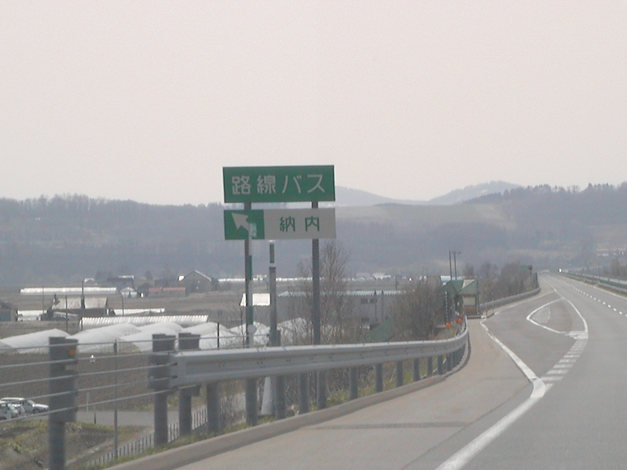 道央自動車道の納内バスストップ